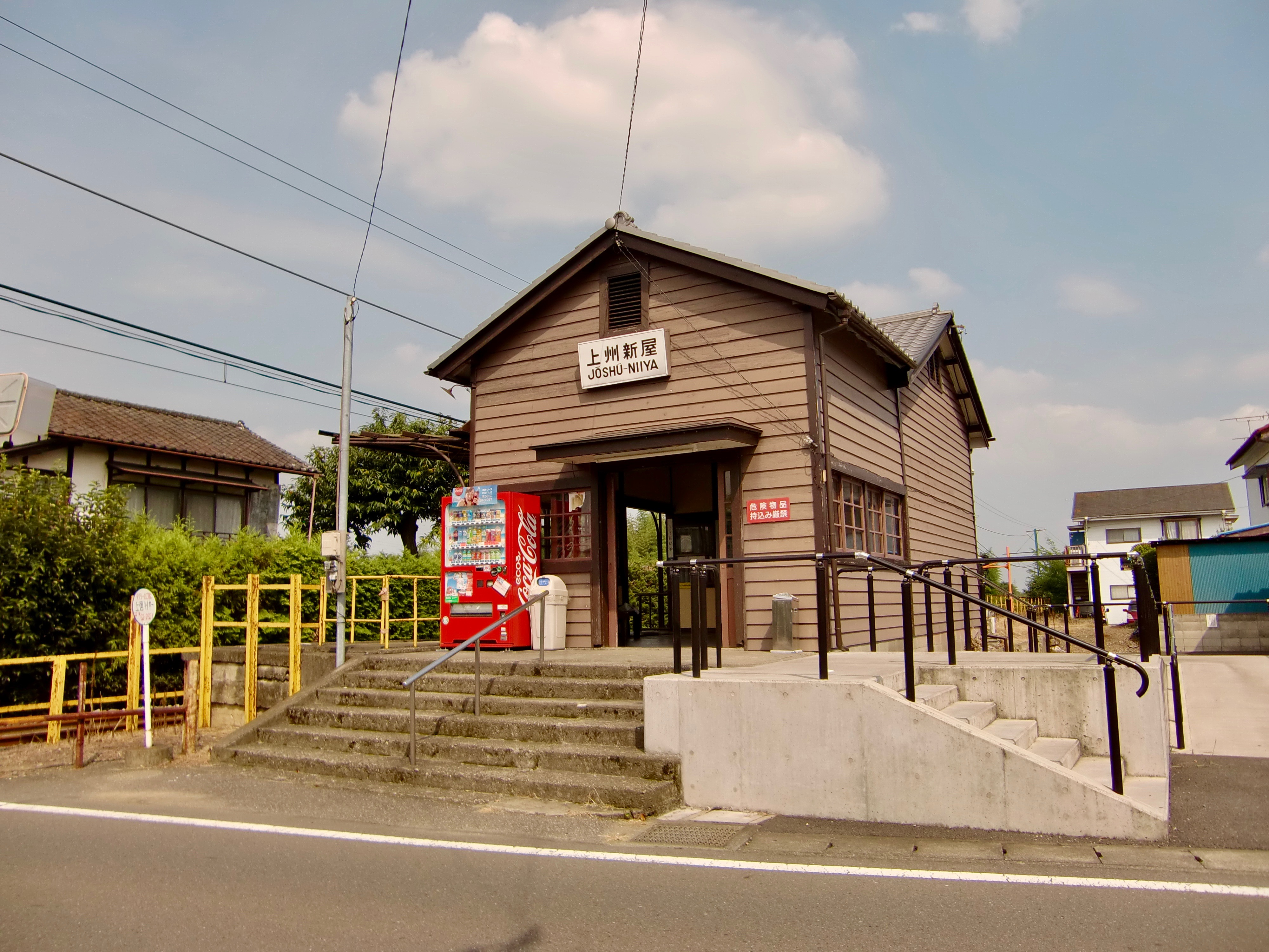 上信電鉄上州新屋駅